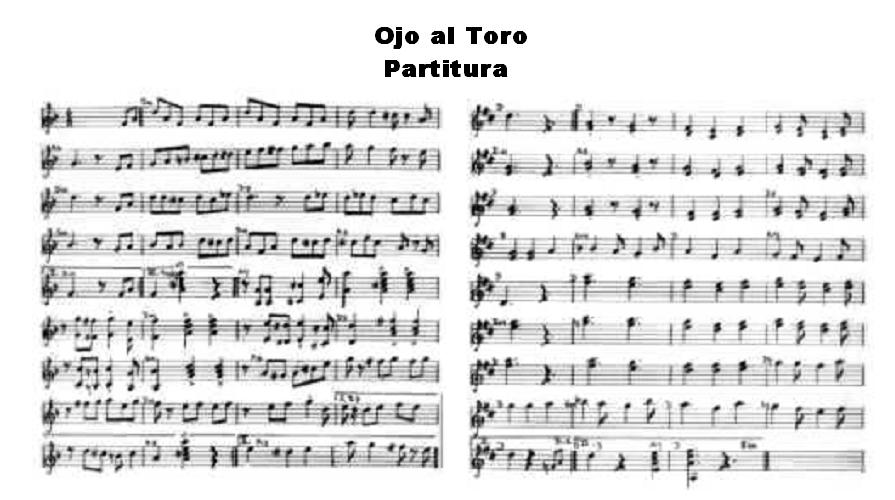 Partitura musical de la composicion musical de Cantalisio Rojas "Ojo al Toro".